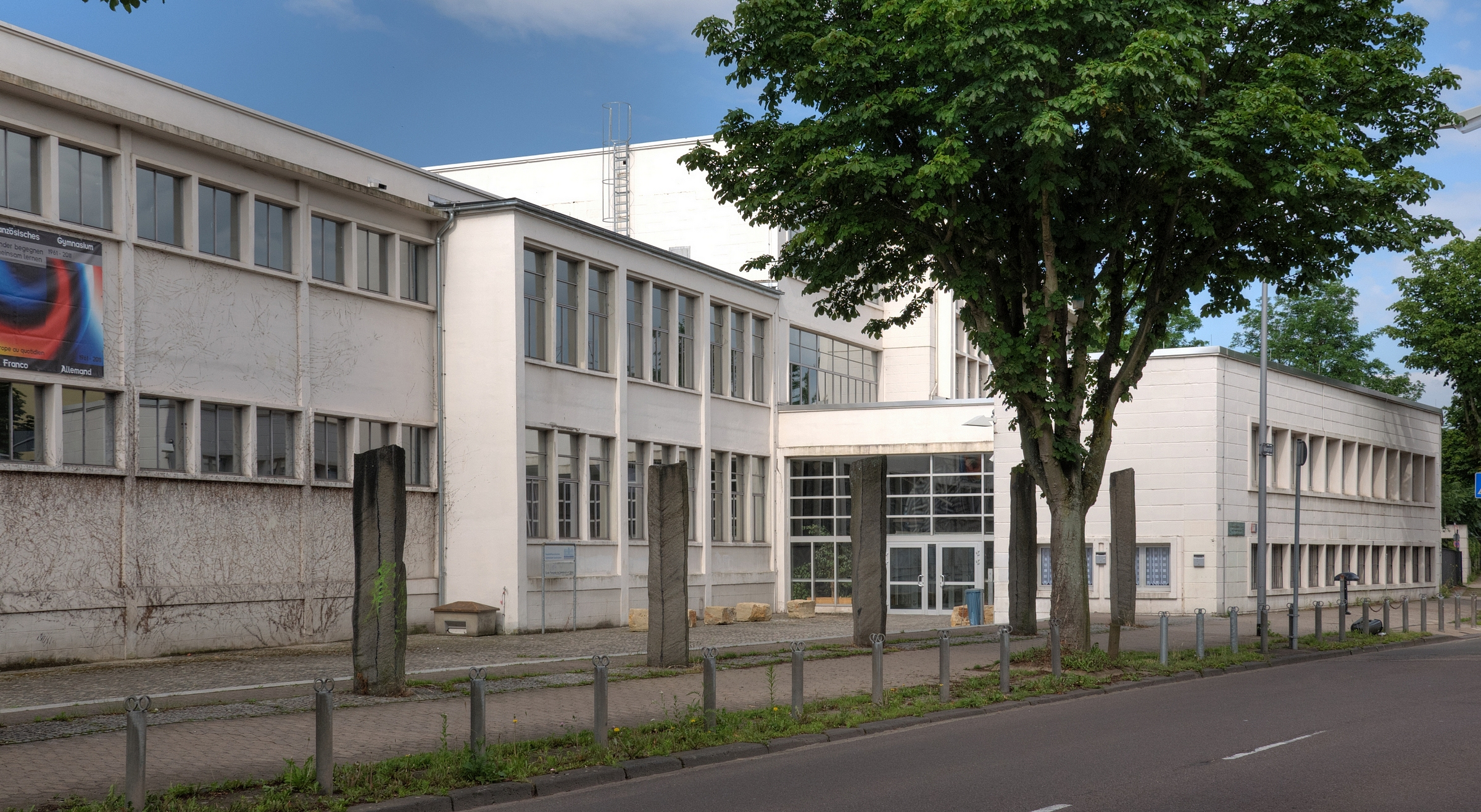 Das Deutsch-Französische Gymnasium in Saarbrücken.